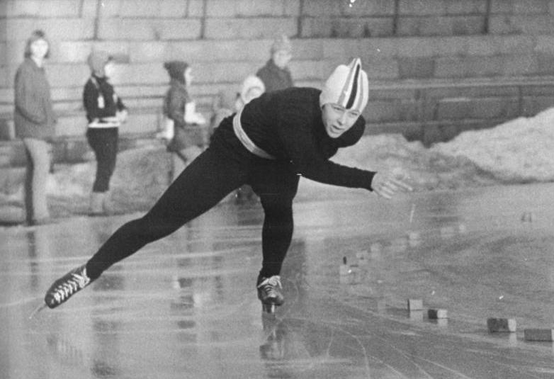 Ruth Schleiermacher Zentralbild Mittelstädt 6.2.71 Berlin: DDR-Meisterschaften im Eisschnellauf im Berliner Dynamo-Sportforum-Bei den Frauen verteidigte Ruth Schleiermacher (SC Dynamo Berlin) am 5.2.71 in 45,0 s ihren Titel über 500 m mit Erfolg. Damit sicherte sie sich nach ihren Vortagssieg über 1500 m bereits den zweiten DDR-Meistertitel. Abgebildete Personen: Schleiermacher, Ruth: Eisschnelläuferin, Olympiateilnehmerin 1968 und 1972, DDR